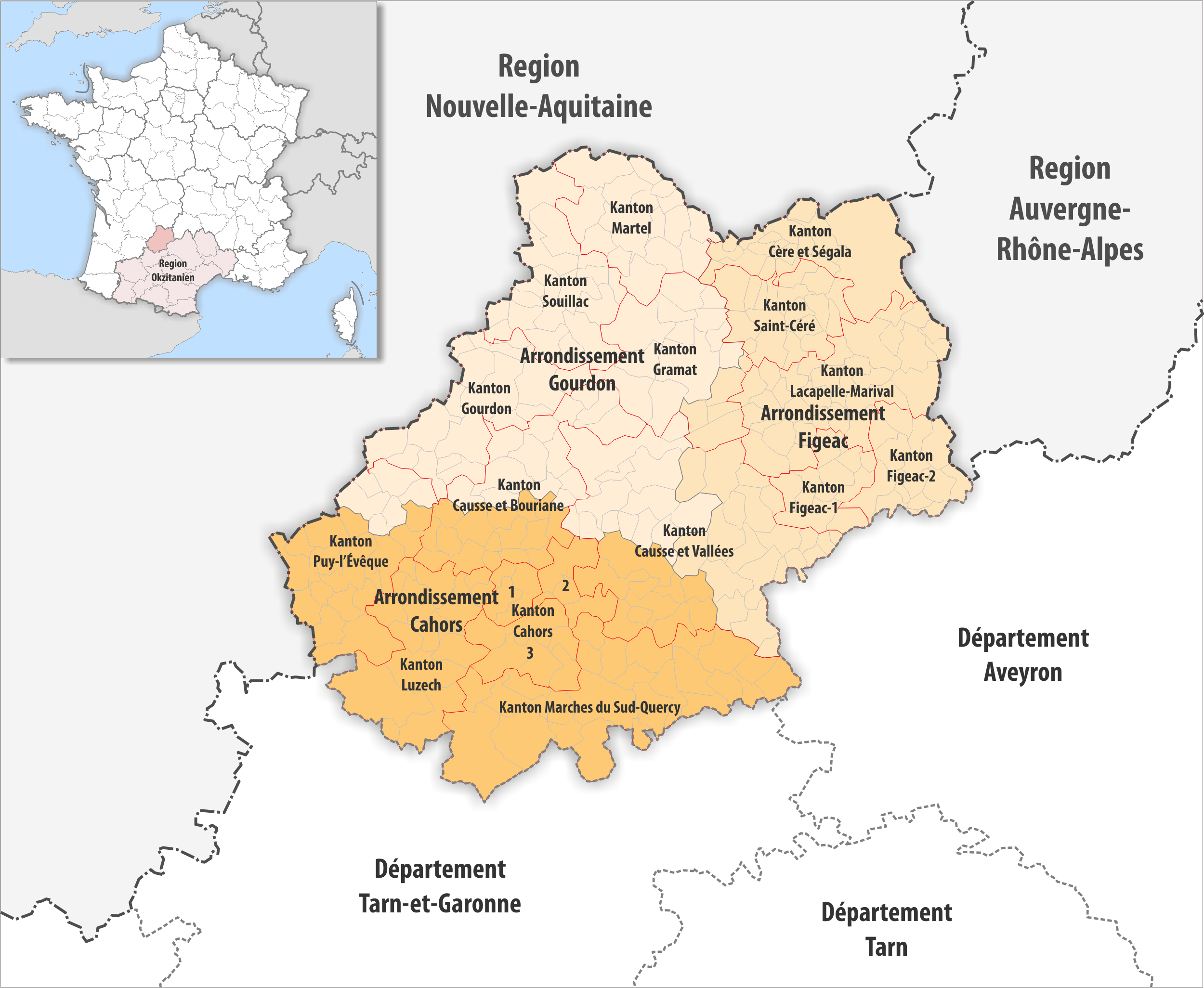 Gemeinden, Kantone und Arrondissemente im Departement Lot